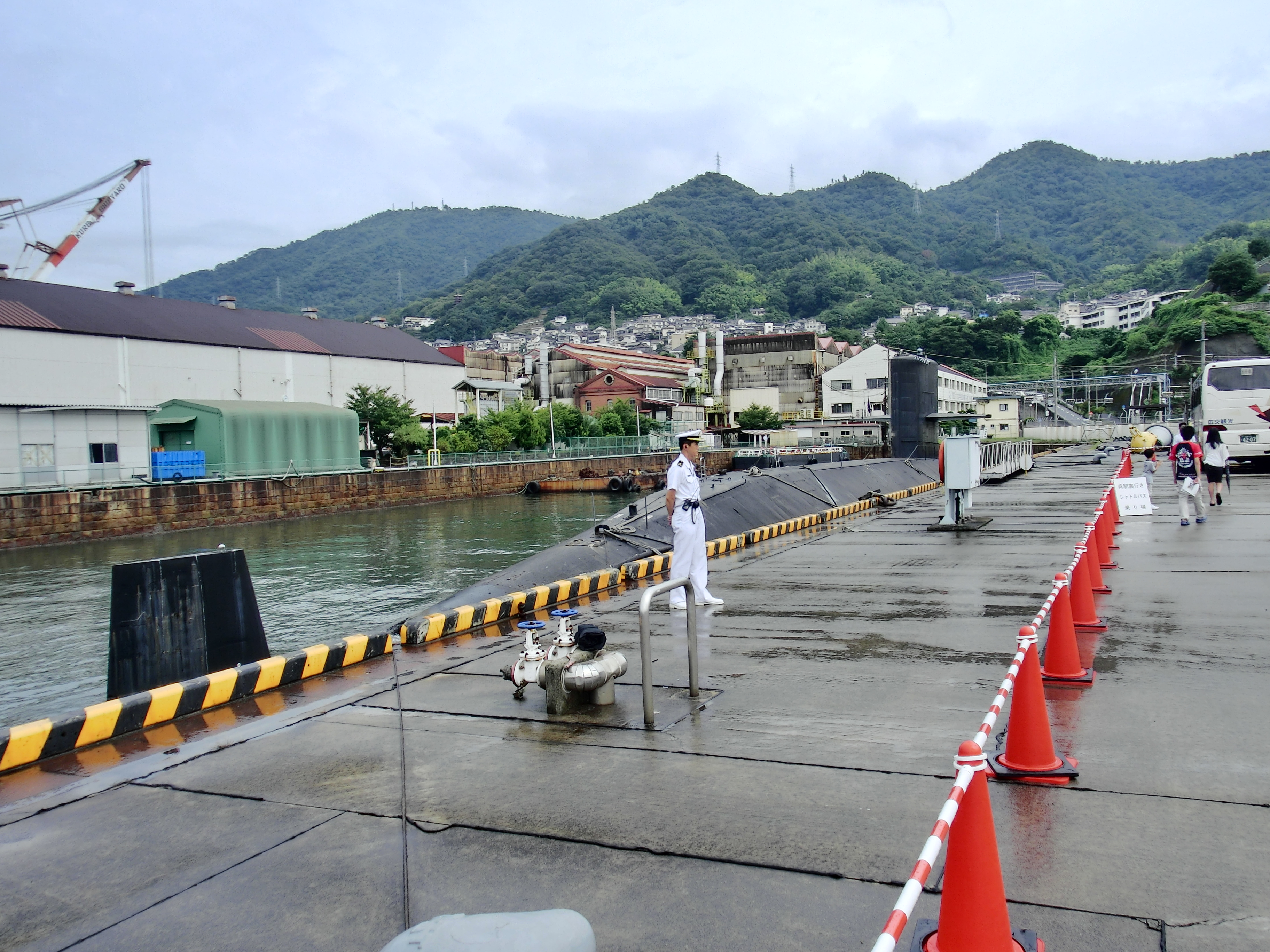 呉・Dバースに係留中の除籍潜水艦はやしお。前日に続いて雨天中止となった平成25年度呉地方隊展示訓練にて。